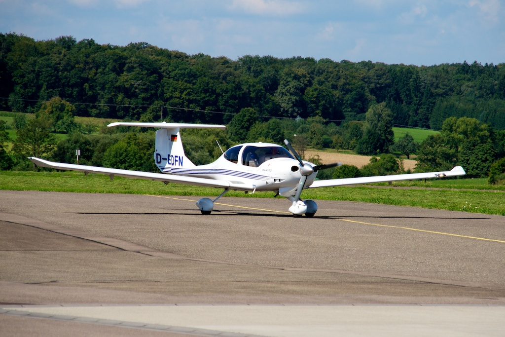 Diamond DA40 TDI